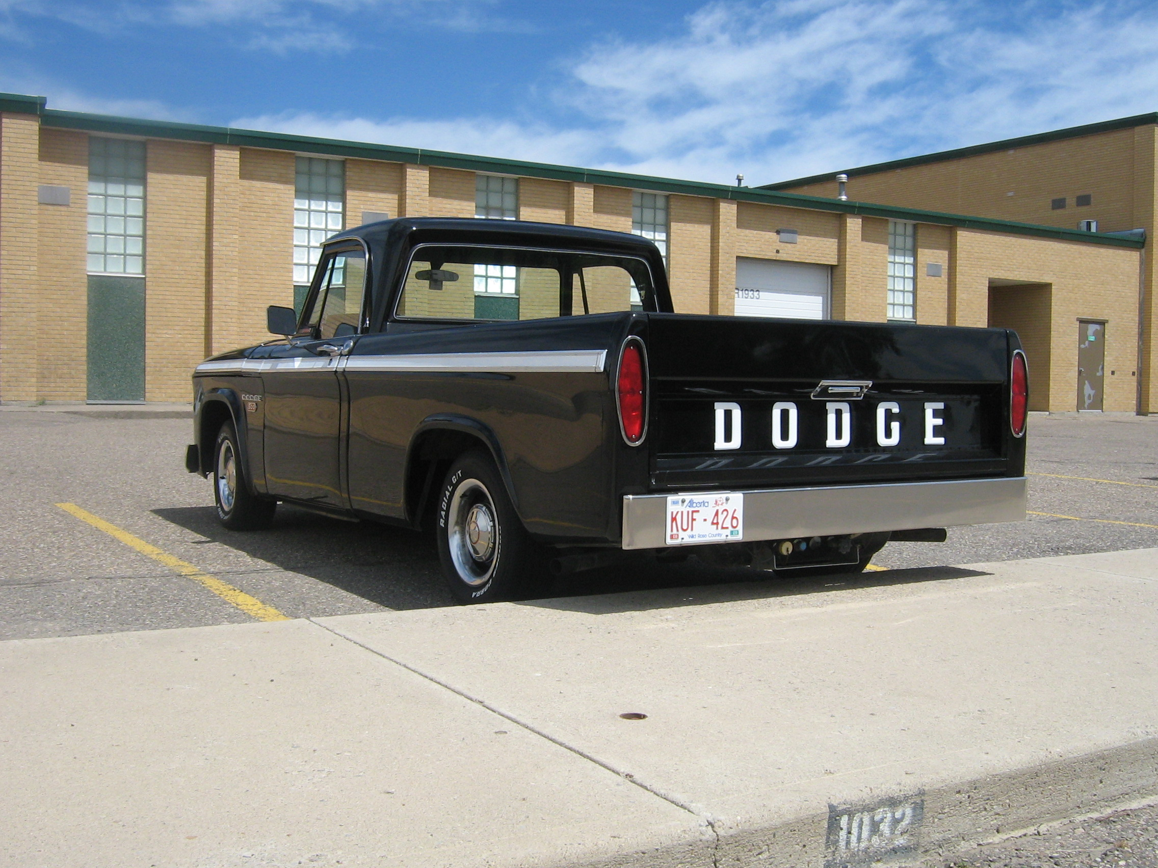 1966 Dodge 500 Truck